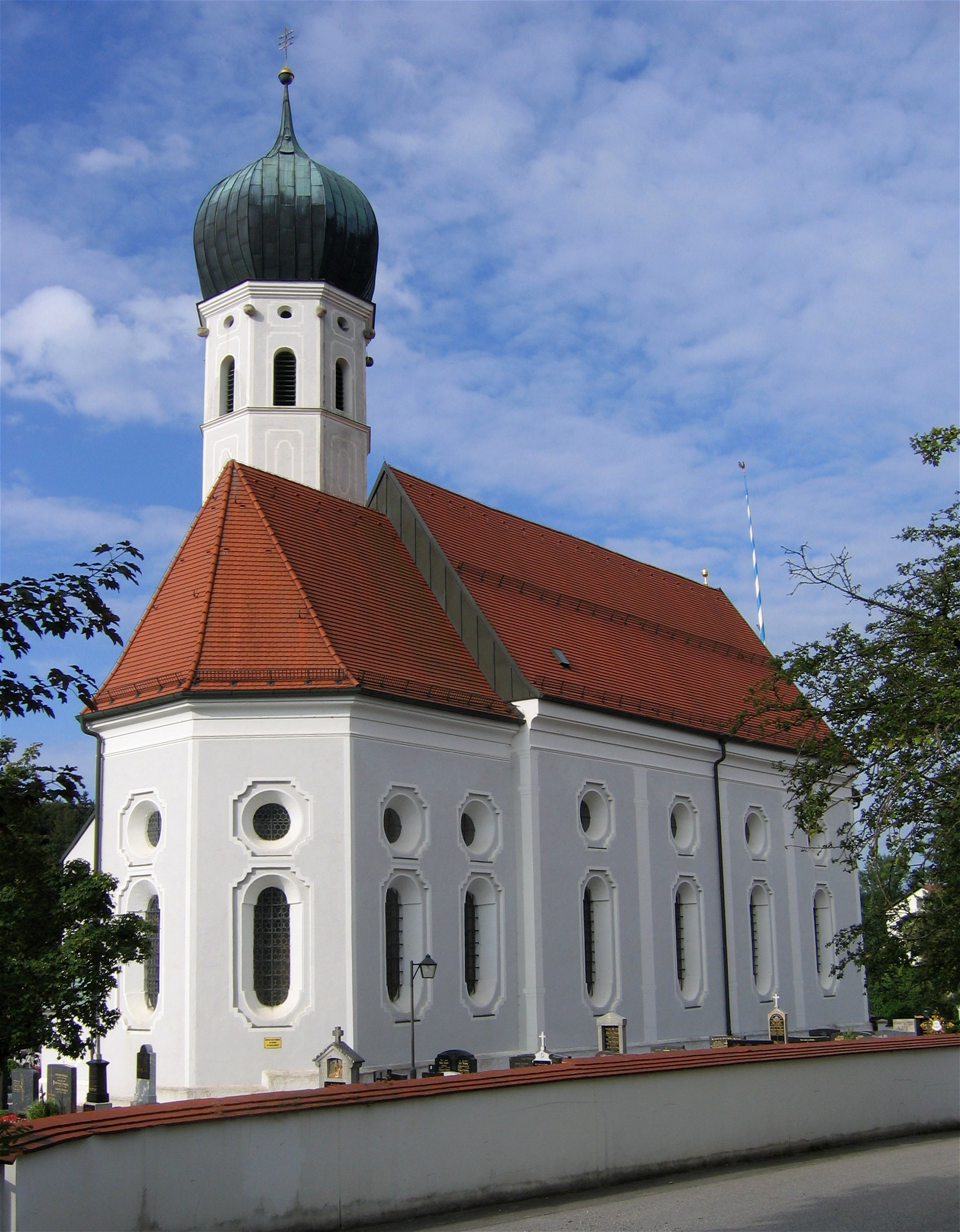 Kleinhelfendorf 9. Kath. Pfarrkirche St. Emmeram, barocke Saalkirche auf romanischer Grundlage mit wenig eingezogenem Polygonalchor, fünfseitigem Vorzeichen, angefügter Skaristei und romanischem Turm mit barocker Zwiebelhaube, Chor von Alex Gugler, 1466, Langhaus von Constantin Pader, 1668/69; mit Ausstattung; Gemeindefriedhof mit Grabmälern; Friedhofsmauer; Kriegergedächtniskapelle, um 1925.